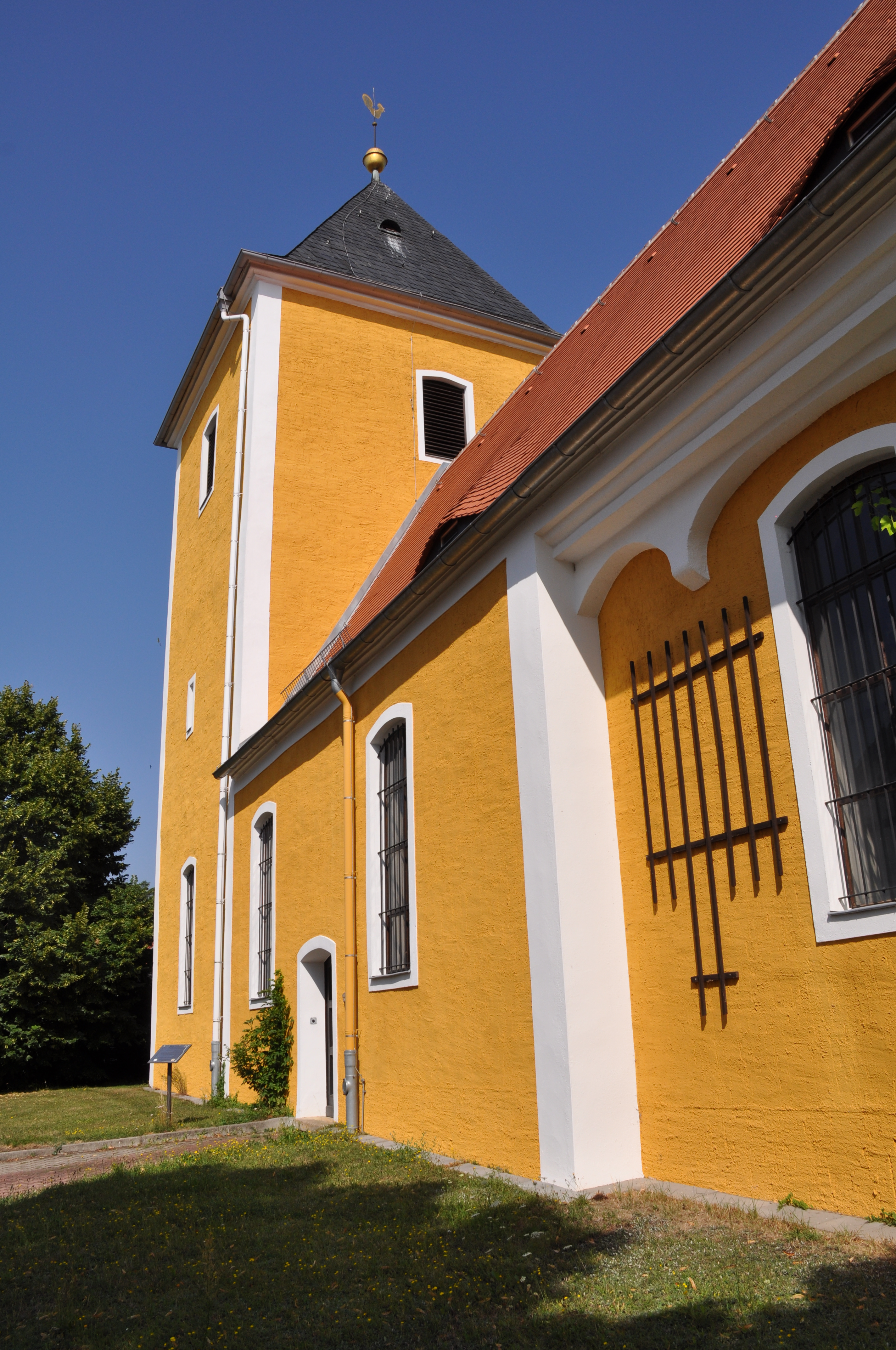 Nischwitz (Gemeinde Thallwitz, Landkreis Leipzig), Kirche